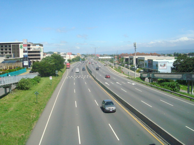 Moderna autopista en San Rafael de Escazú